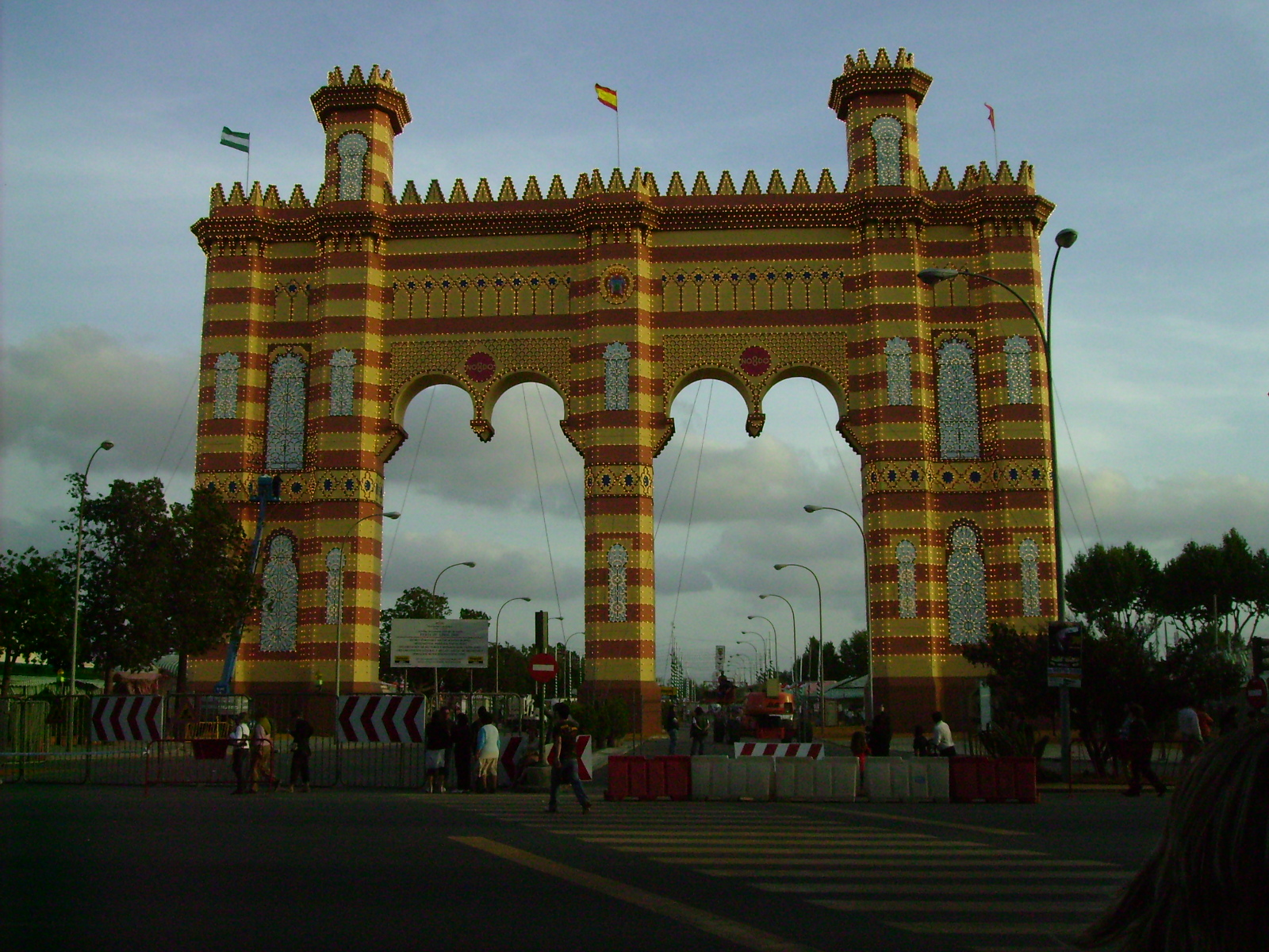 Portada de la Feria de Abril de Sevilla (año 2008). Representación del Costurero de la Reina.